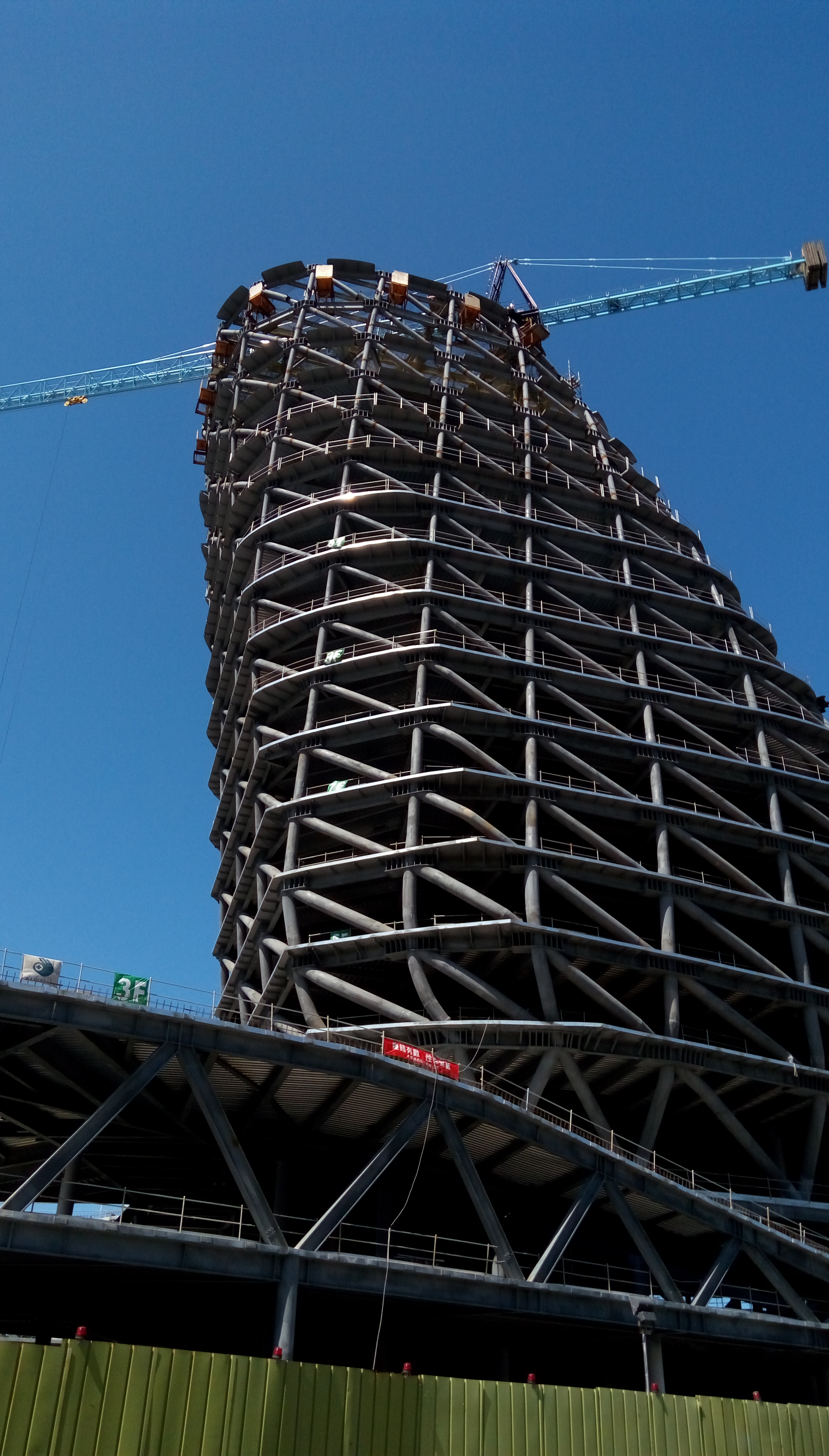 興建中的高雄港埠旅運中心